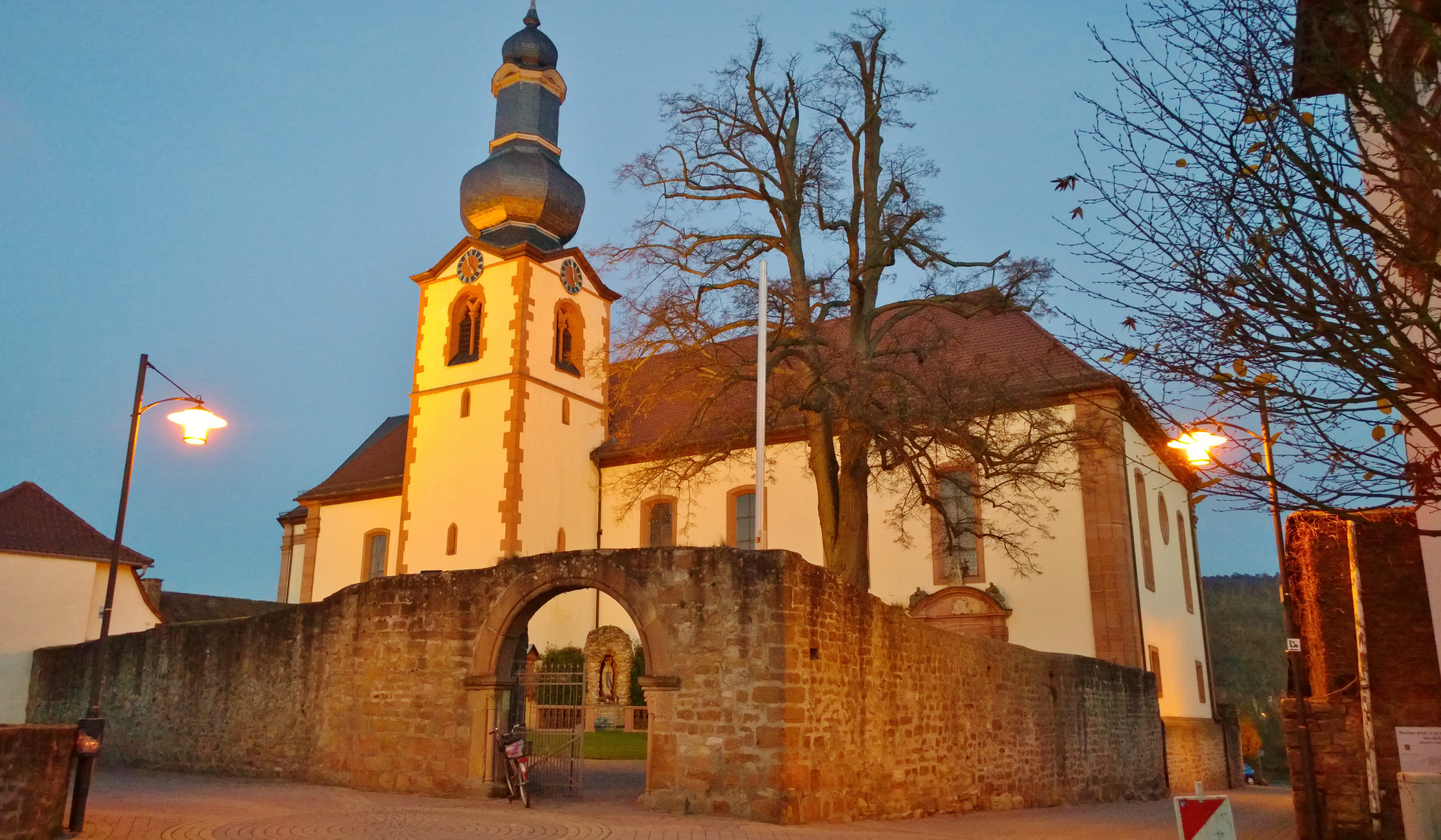 Blick zur Katholischen Pfarrkirche Mariä Himmelfahrt & Peter und Paul in Großwallstadt vom Eingang in die burgartig ummauerte Kirche aus Richtung Kirchgasse